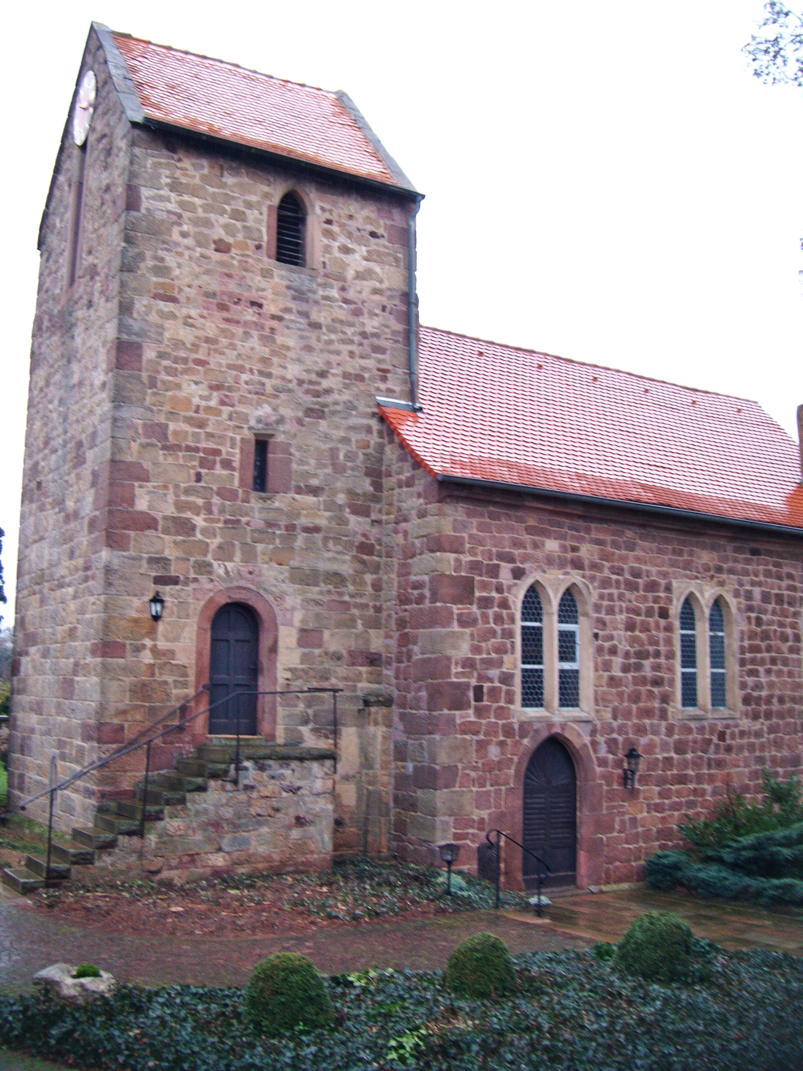 Prot. Martinskirche Battenberg, um 1200, ehemalige Eigenkirche der Abtei Glandern in Lothringen. Aufgenommen von Süden.